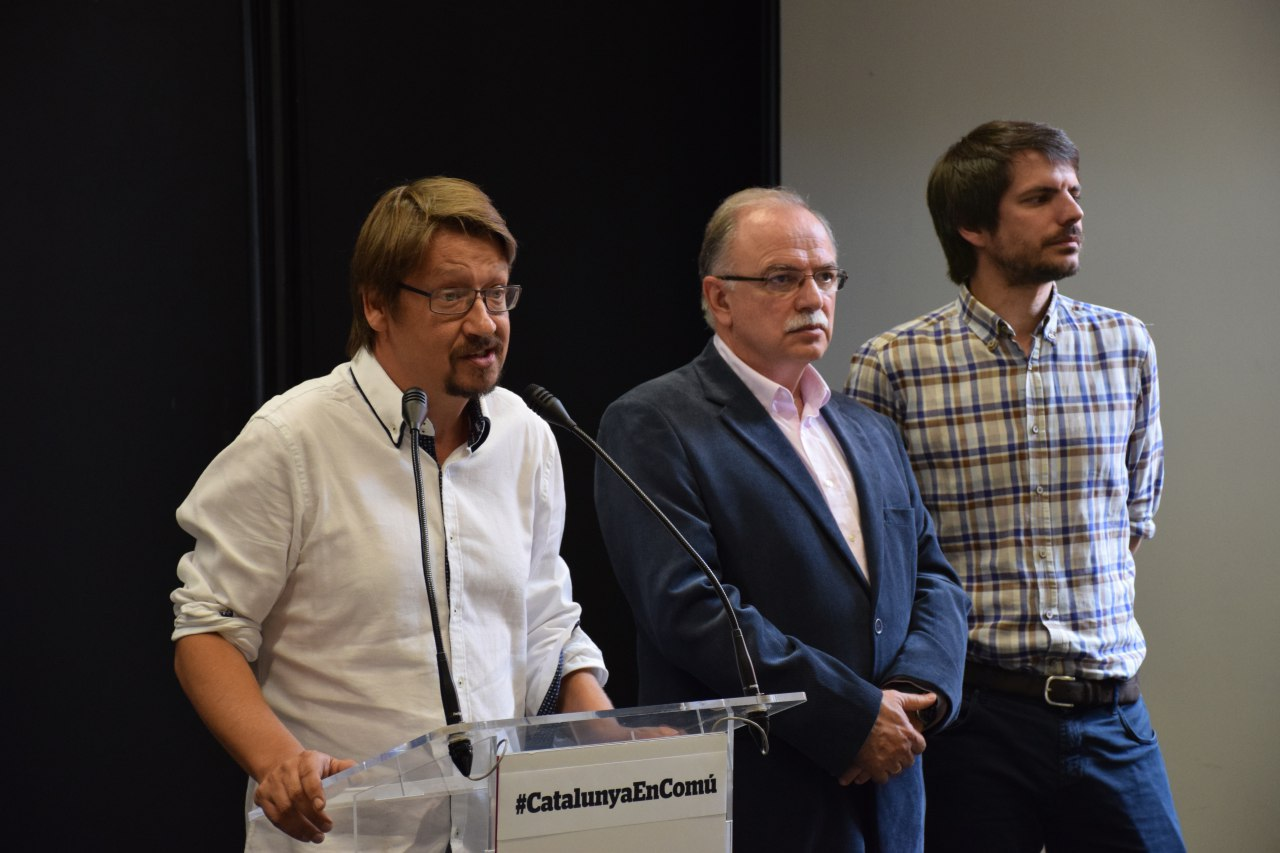 Nota de premsa Xavier Domènech presentació Catalunya en comú